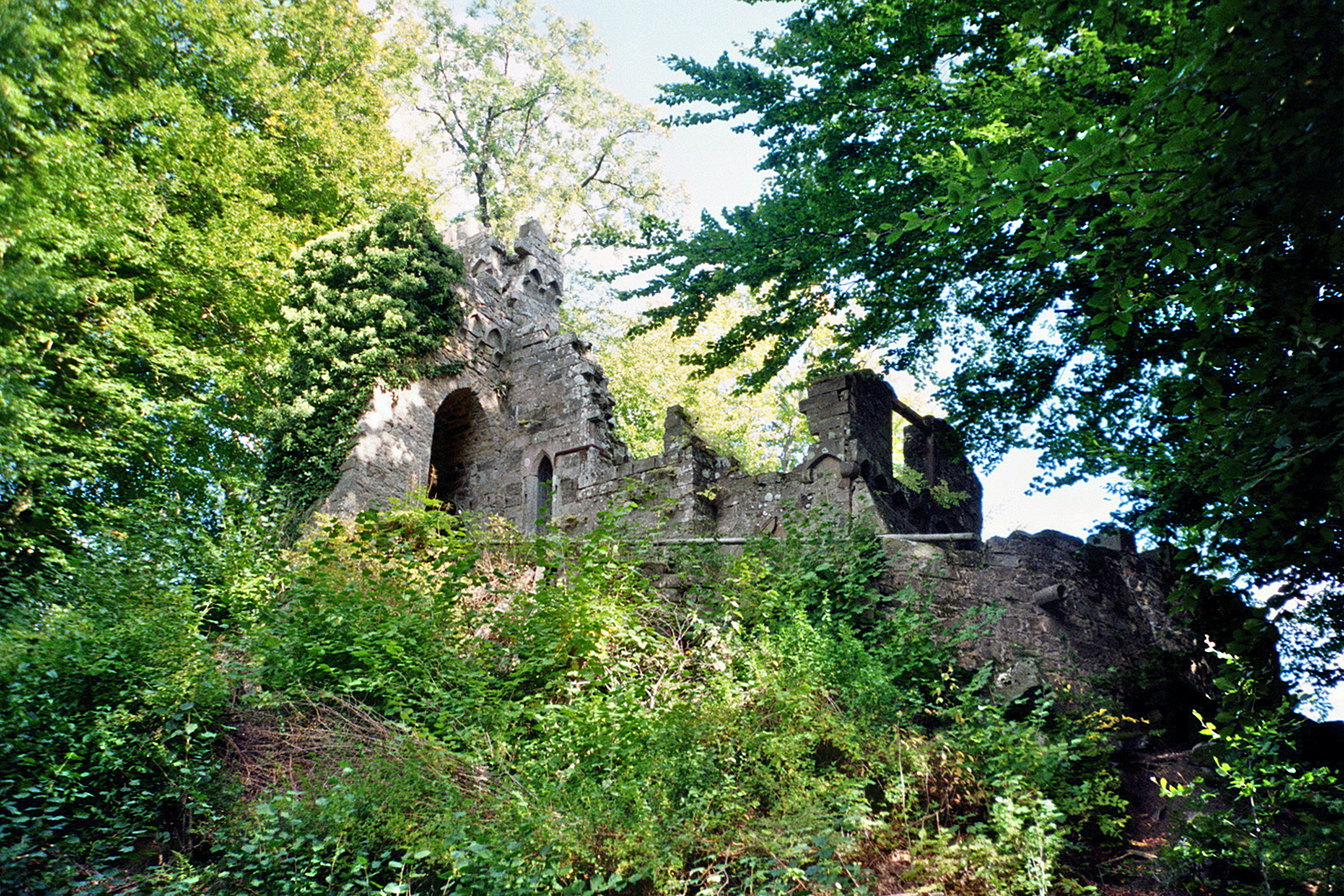 Englischer Garten Eulbach: künstliche Burgruine Eberhardsburg.